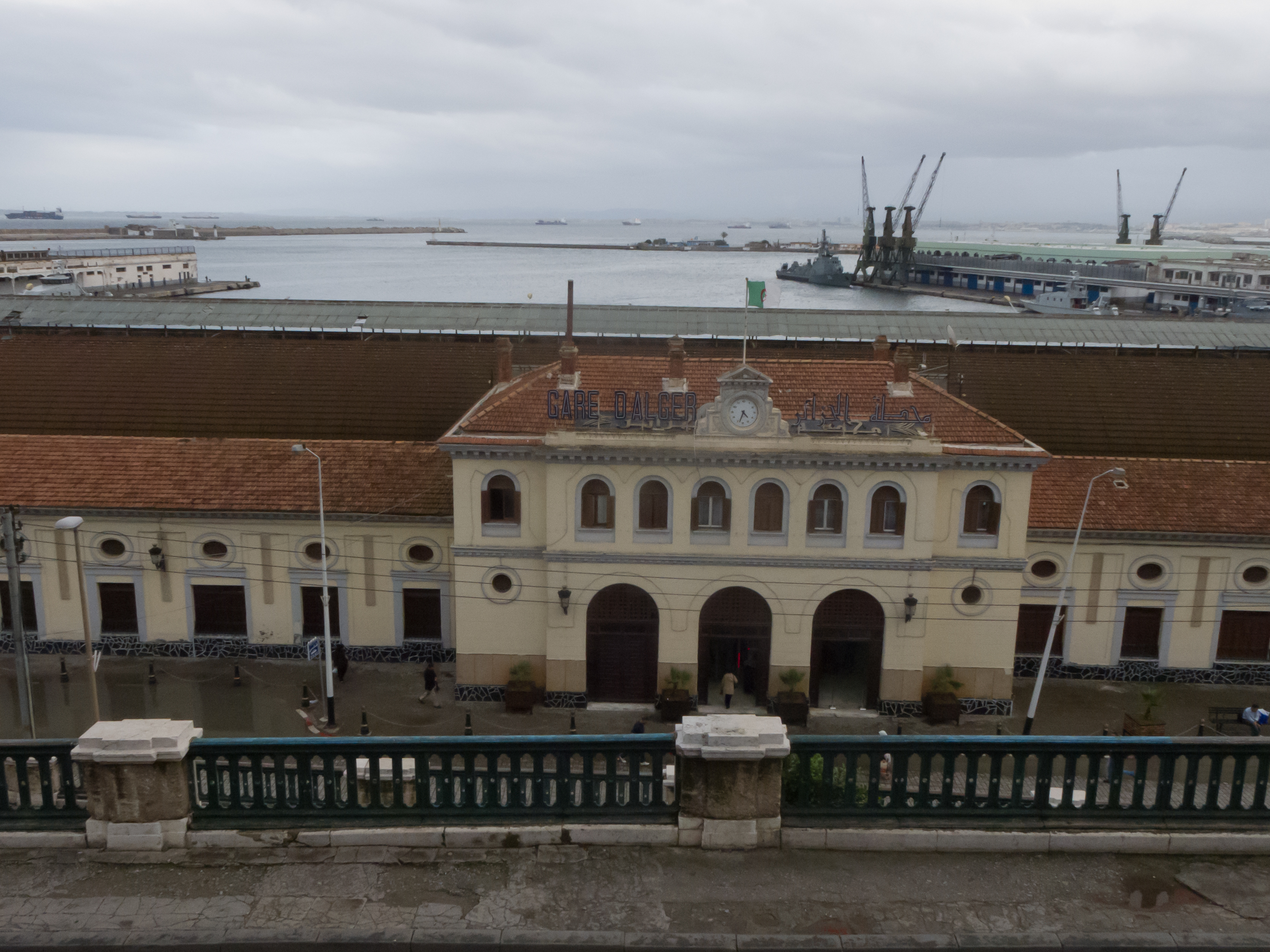 Vue de la gare d'Alger-Centre en octobre 2010 / Alger, Algérie